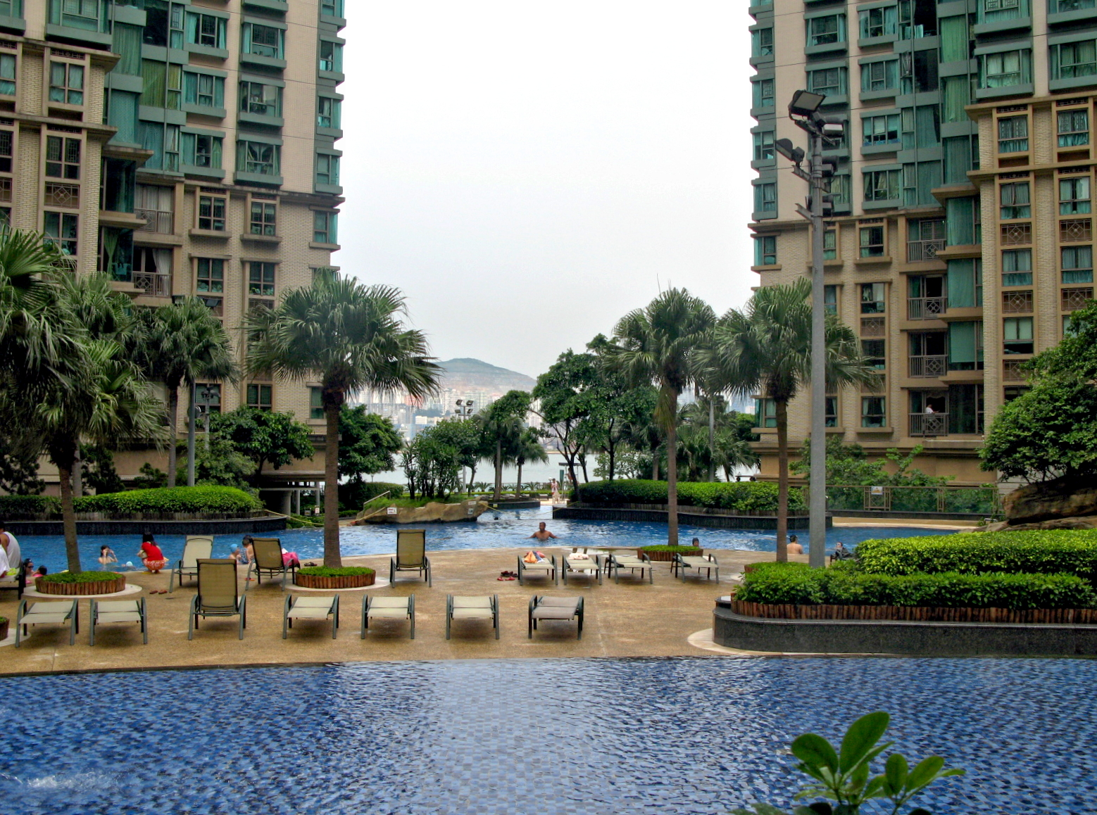 海逸豪園泳池 HK Laguna Verde Swimming Pool